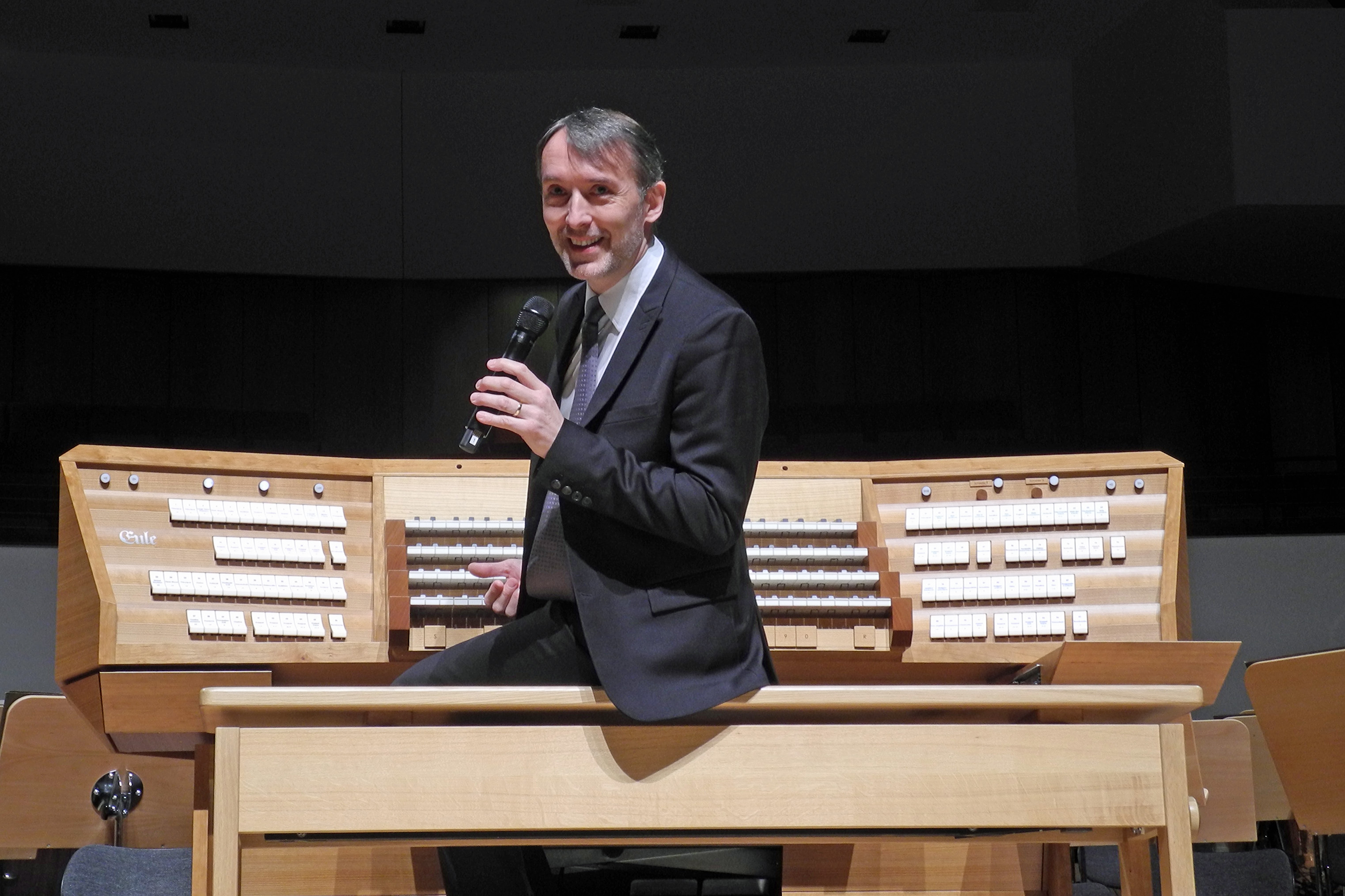 Tag des offenen Denkmals 2017 in Dresden – Eröffnung im Kulturpalast mit Erläuterungen zur neuen Eule-Orgel und einem Orgelkonzert mit Olivier Latry (Titularorganist an der Kathedrale Notre-Dame de Paris, 2017/18 Palastorganist in Dresden)